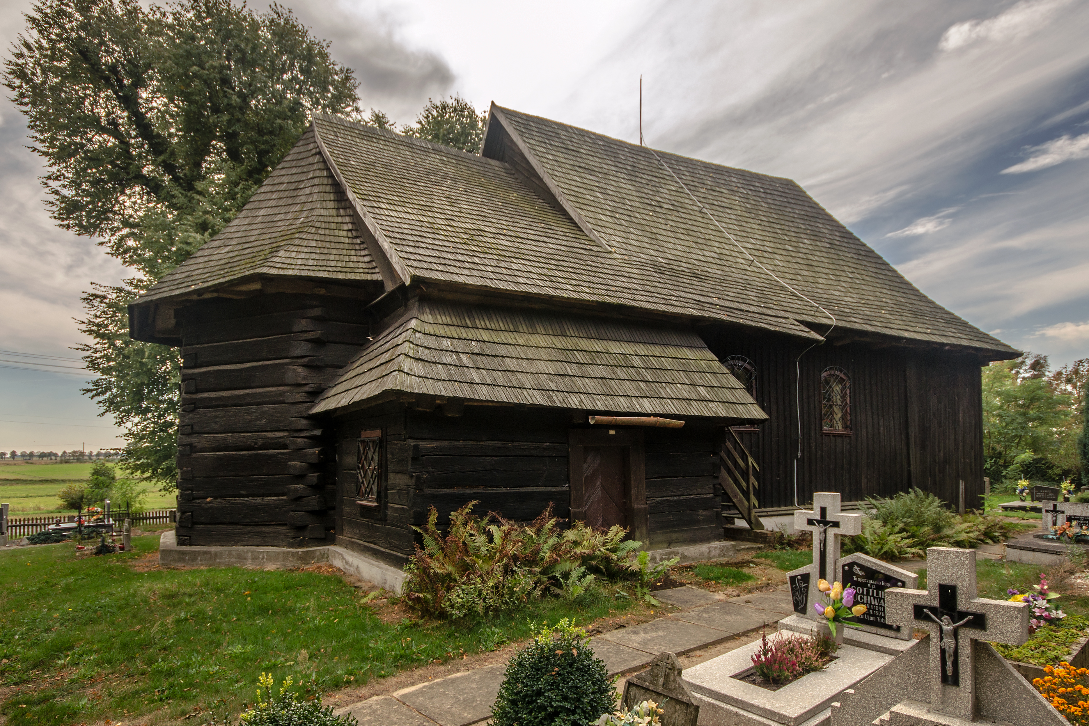 Maciejów, kościół ewangelicki, XVI/XVII